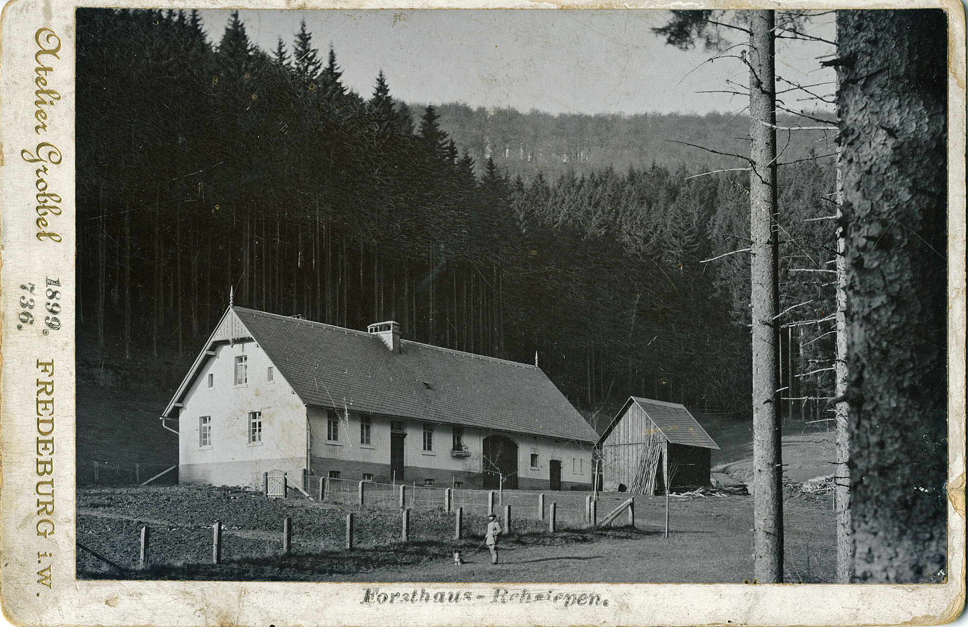 Forsthaus Rehsiepen im Schmallenberger Sorpetal (Hochsauerland), 14 Jahre nach Erbauung